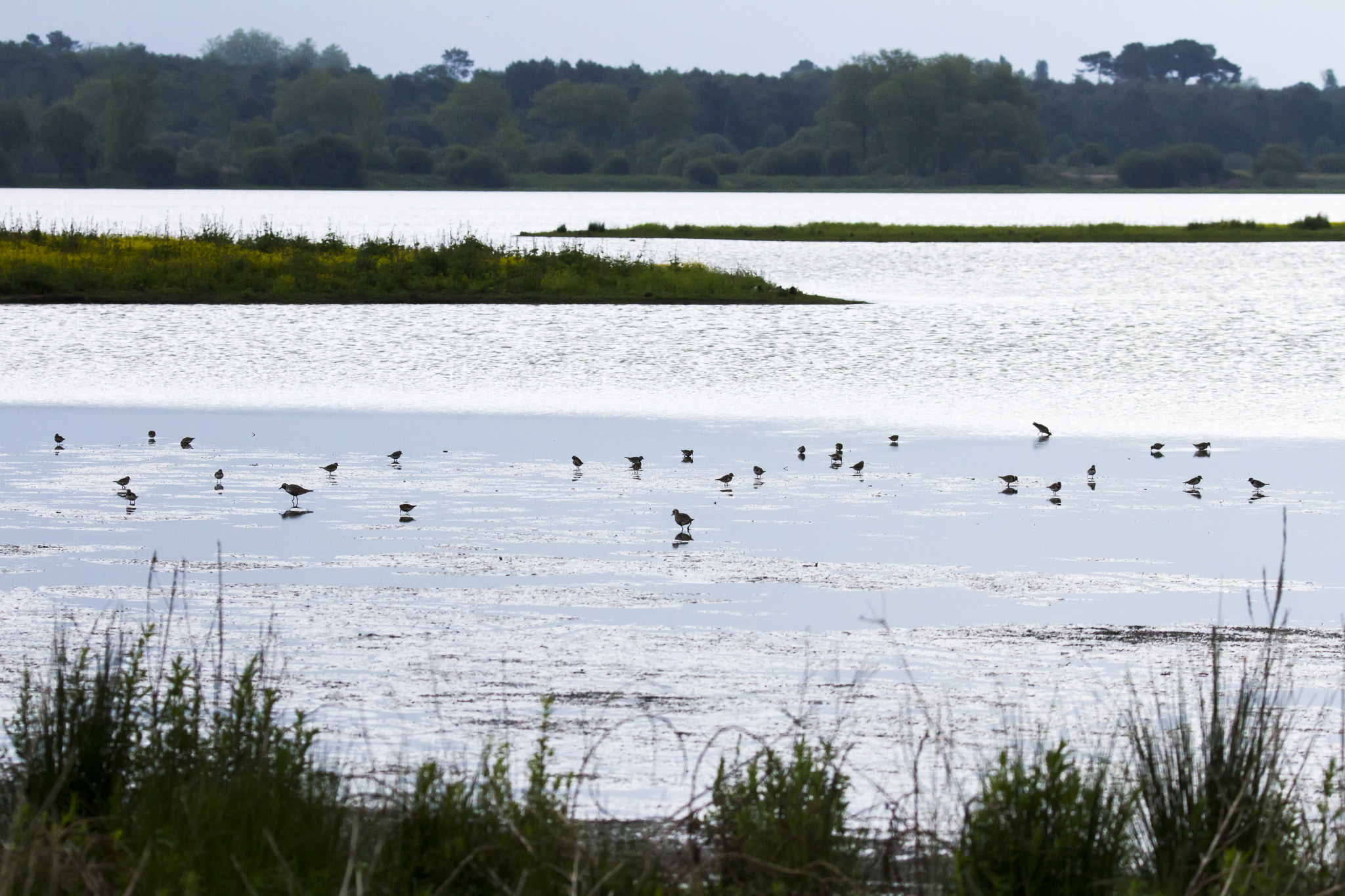 Contre jour sur le marais d'orx le matin